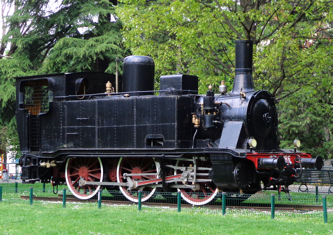 Locomotiva a vapore 851.186 delle Ferrovie dello Stato conservata come monumento a Como.